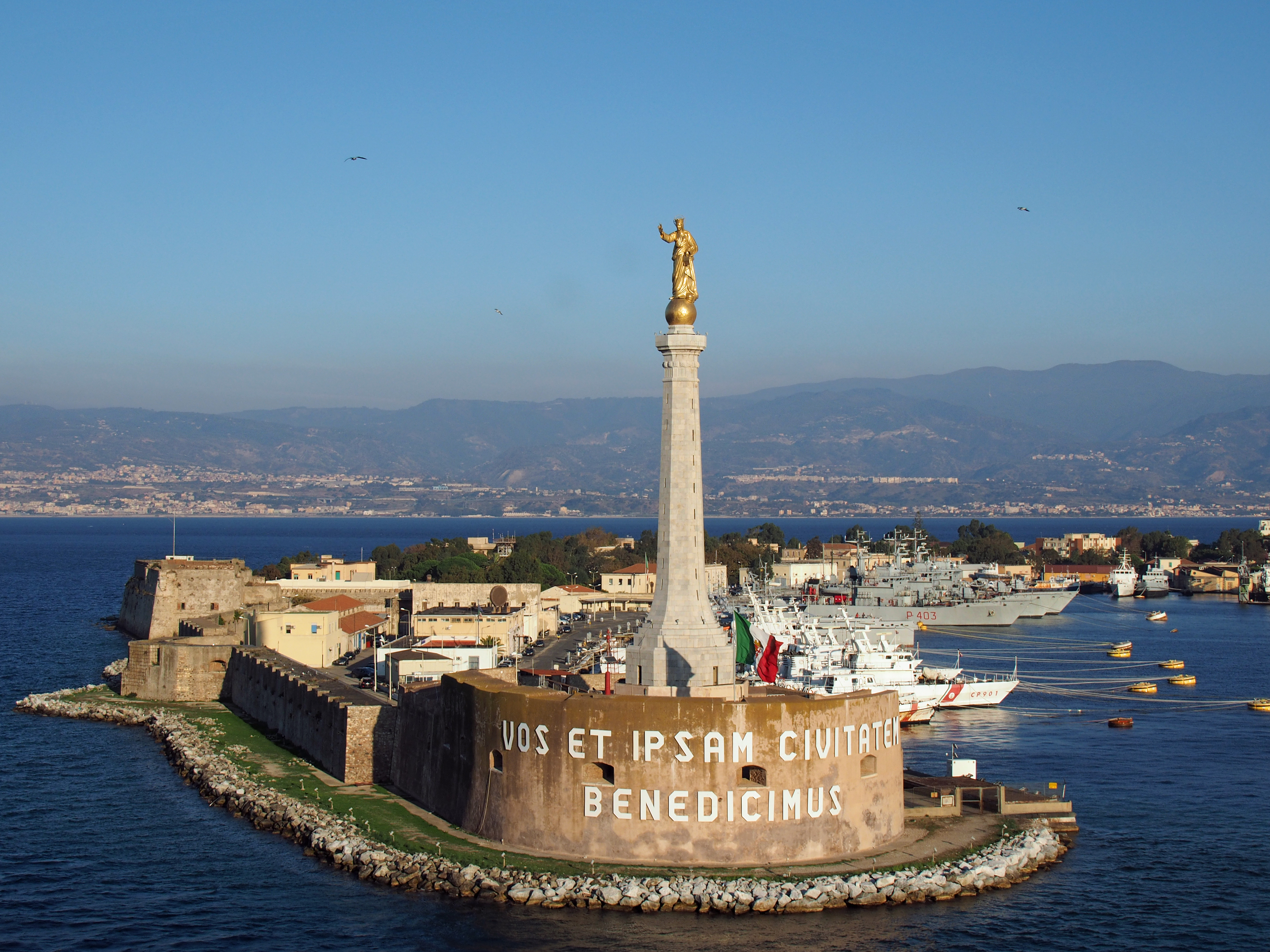 Hafeneinfahrt in Messina (Sizilien) mit dem Mariendenkmal "Madonna della Lettera" und dem Fort San Salvatore